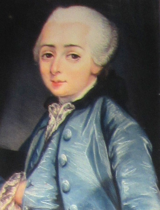 Philippe Antoine Vogt d'Hunolstein (1750-1831)